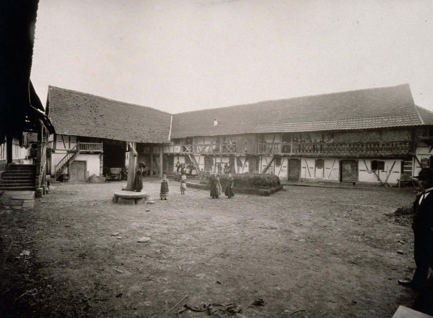 Vue sur la cour et les dépendances de la ferme Jacob à Buswiller, Alsace, France